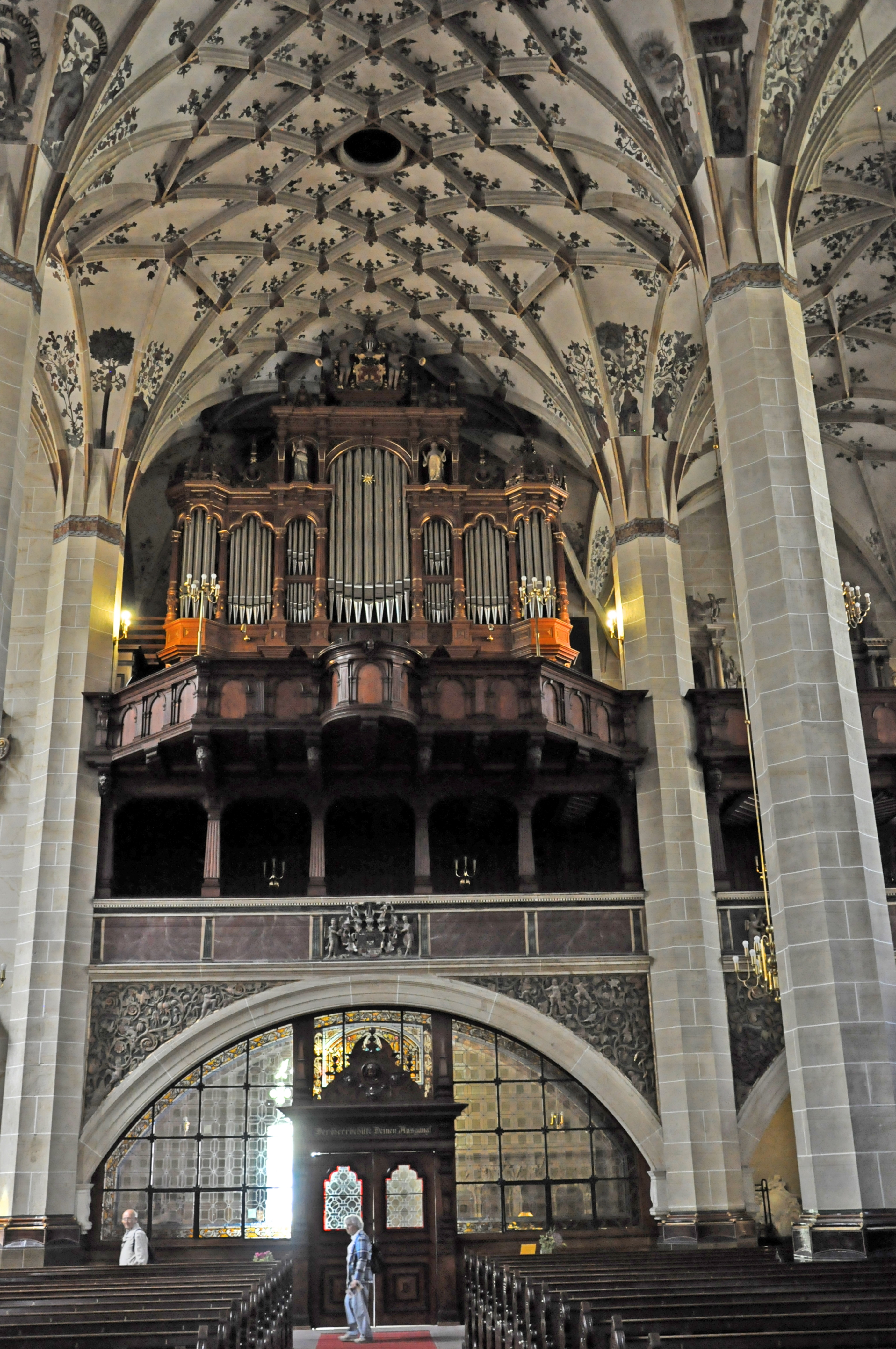 Orgel der Evangelischen Stadtkirche St. Marien in Pirna, Sachsen